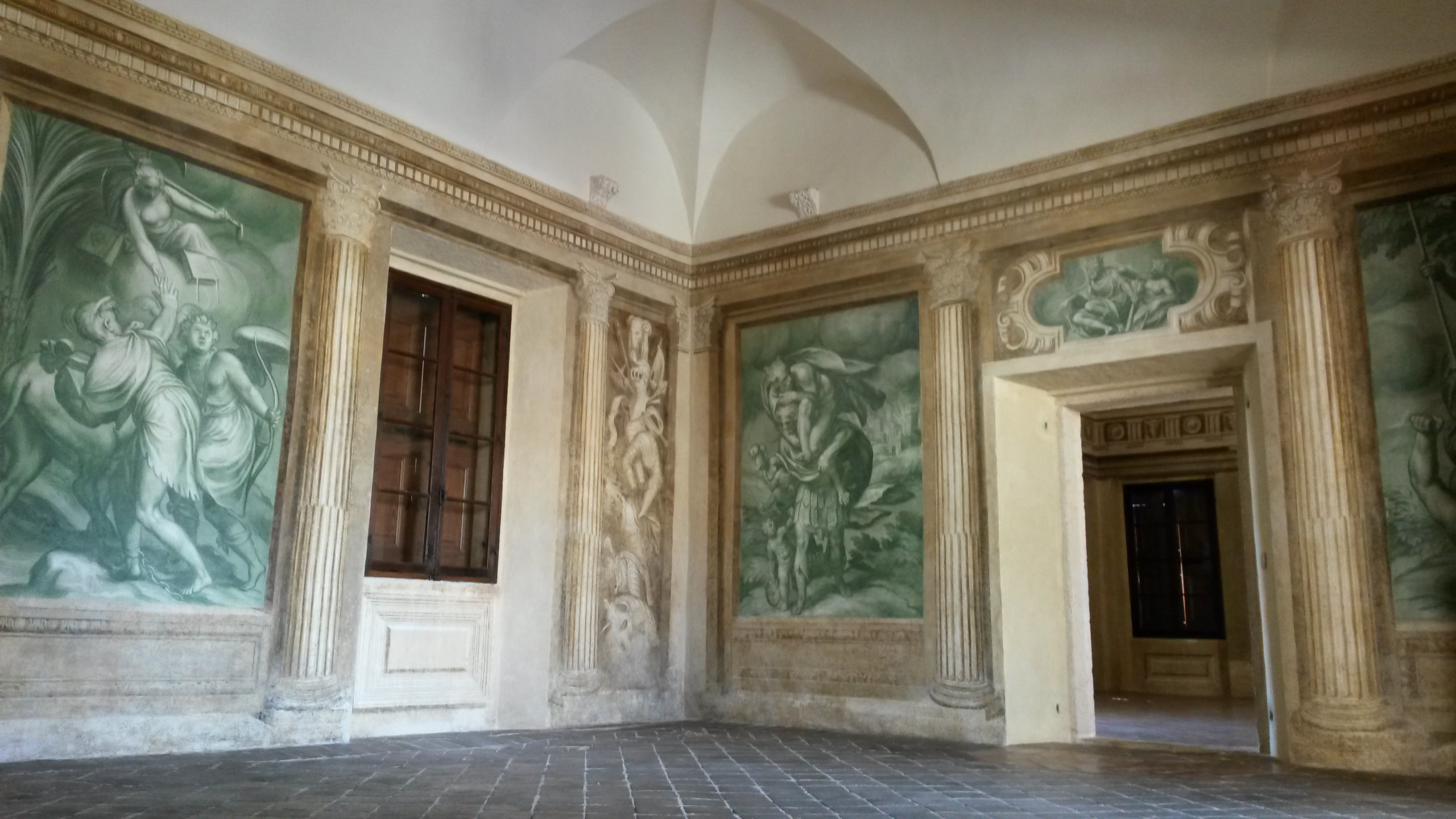 Affreschi di Paolo Farinati, 1590 circa (restaurati nel 2016): peristilio di ordine composito e, da sinistra, "Latona con i figli Apollo e Diana", "Incendio di Troia: Enea e Anchise", "Giano bifronte" (in soprapporta).